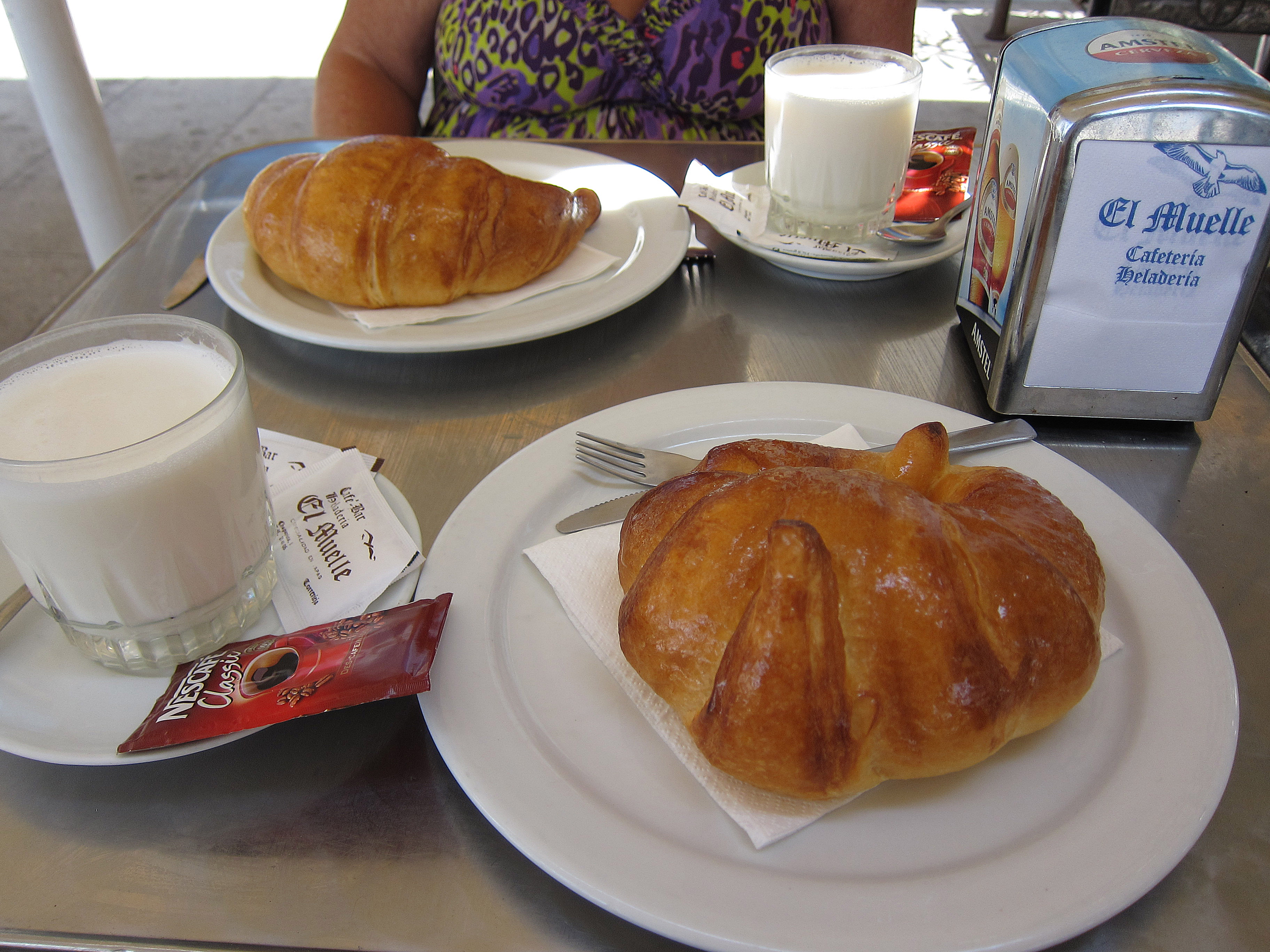 Dos cafés instantáneos y bollos, en un bar en Torrevieja.